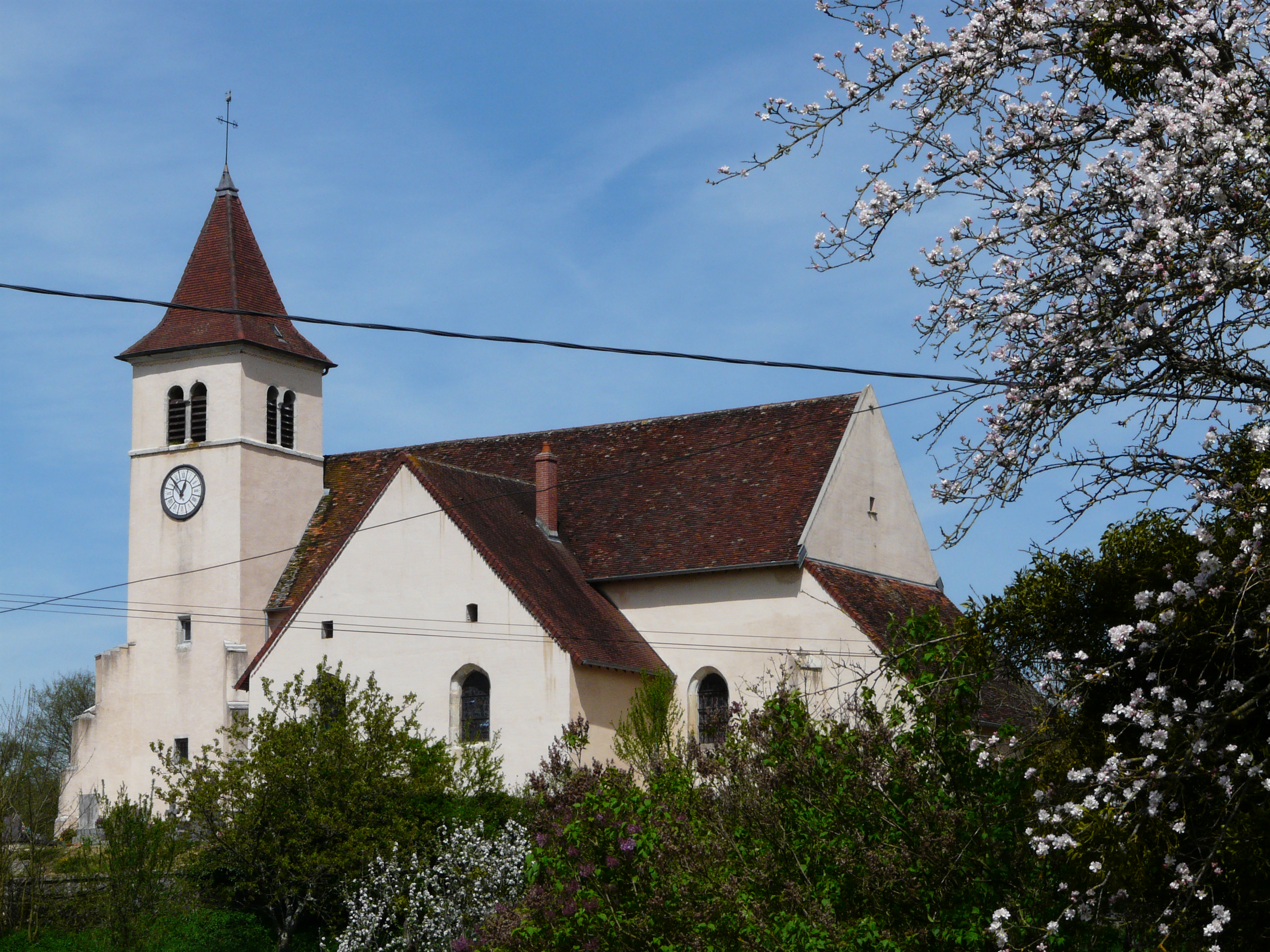 Eglise de Santans